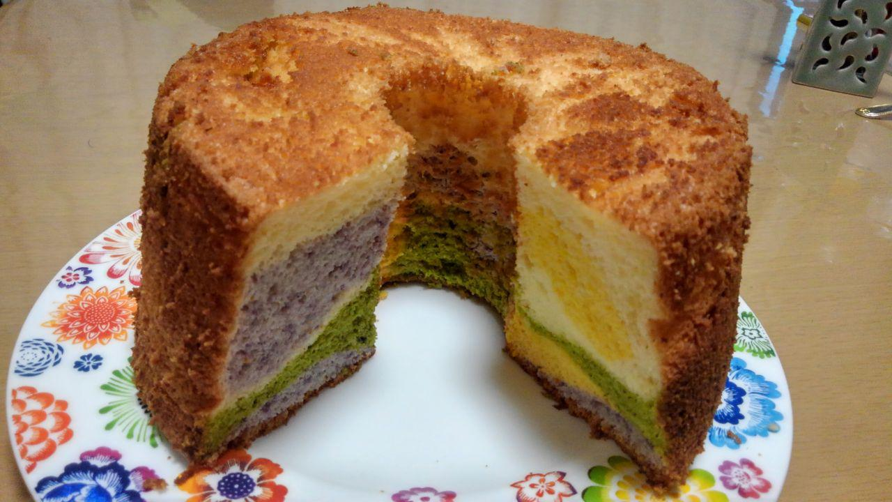 colourful chiffon cake